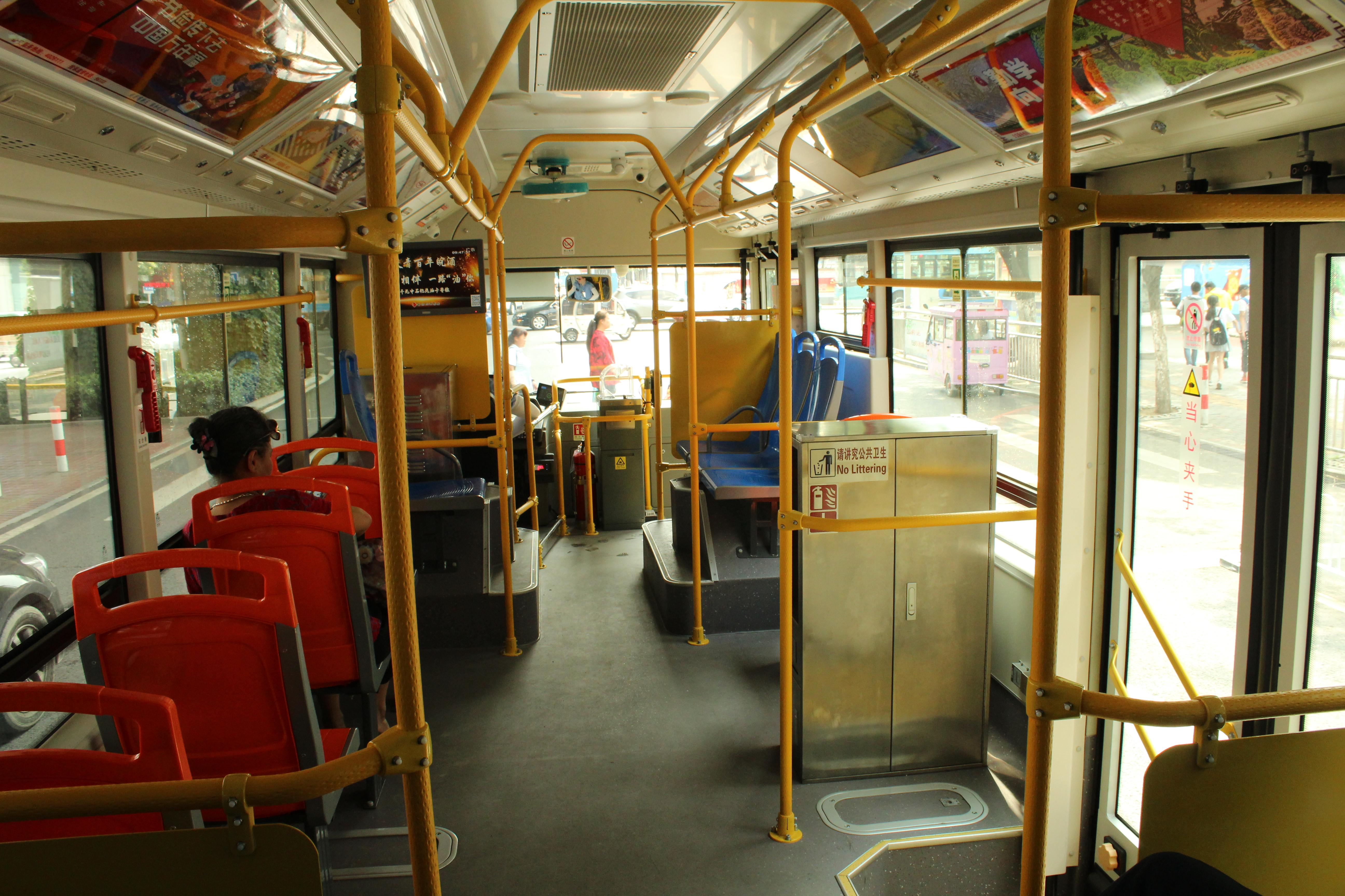 中文（中国大陆）: Bengbu Bus BYD K8 Interior